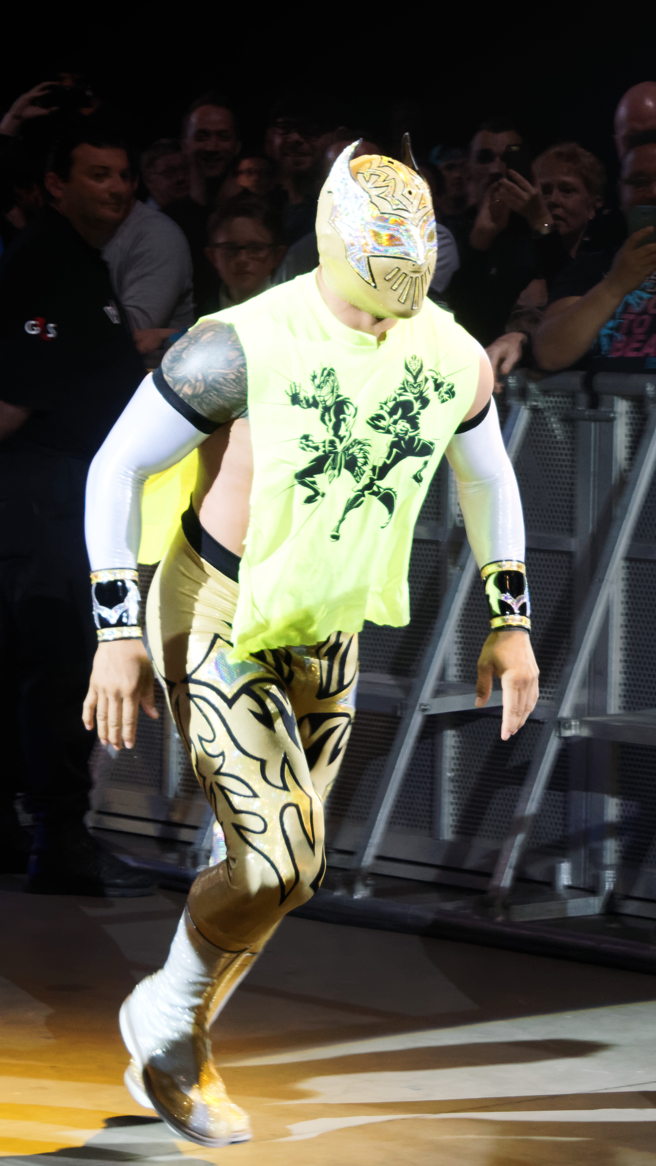 WWE Live@Lotto Arena - Antwerpen